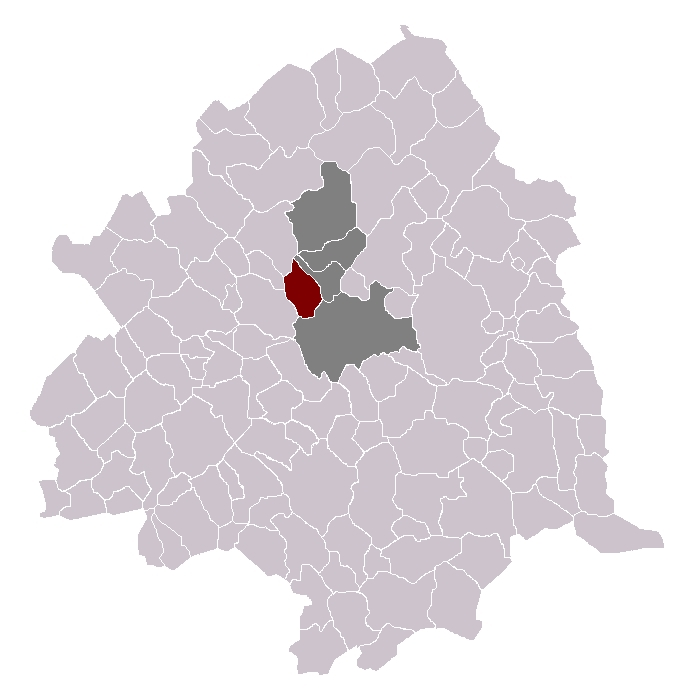 Lambersart dans son canton et son arrondissement